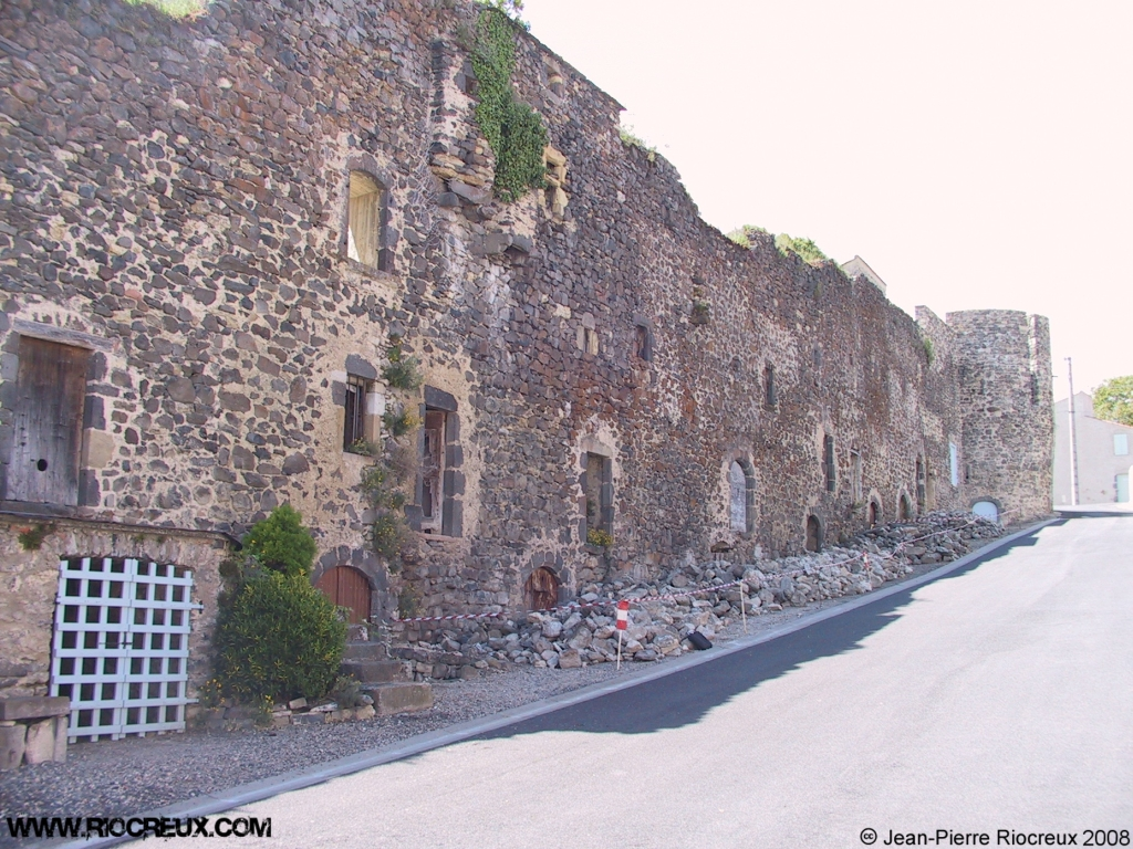 Vue d'un des murs d'enceinte du fort villageois de Mareugheol.